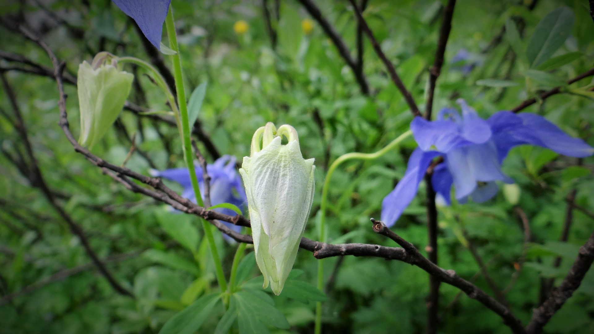 Ancolies des Alpes dans le Parc National de la Vanoise